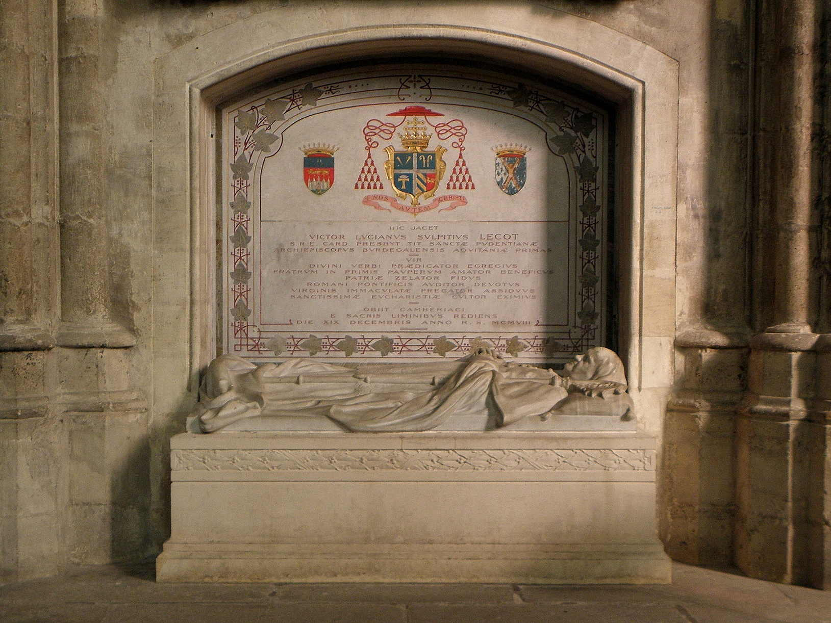 Tombeau du cardinal Victor-Lucien-Sulpice Lécot en la cathédrale Saint-André de Bordeaux (33).